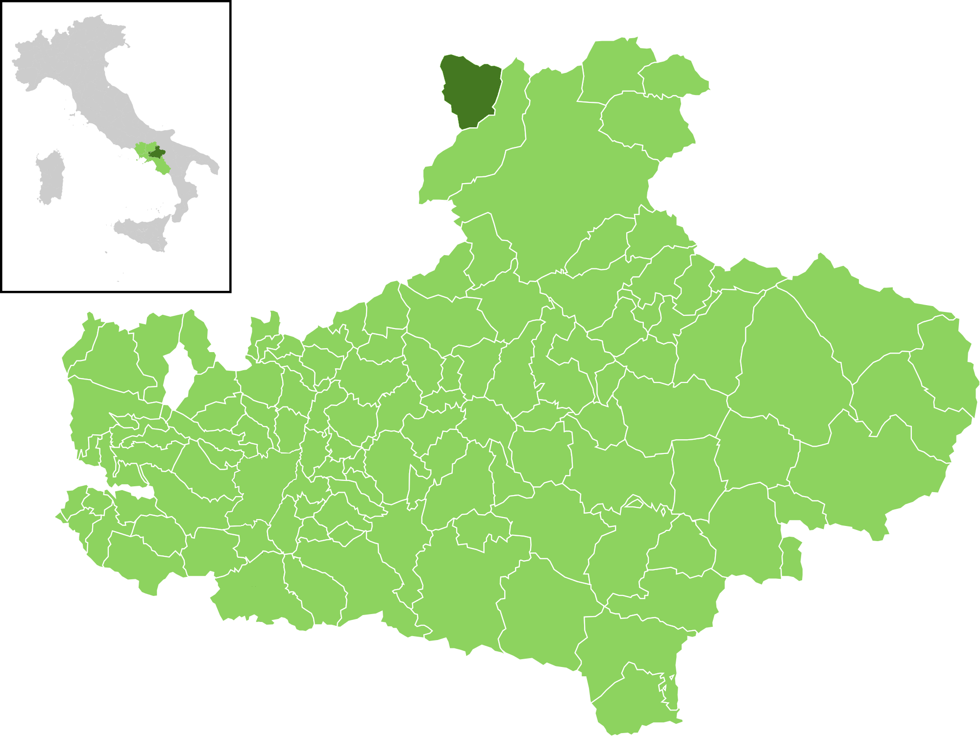 Il comune all'interno della provincia di Avellino